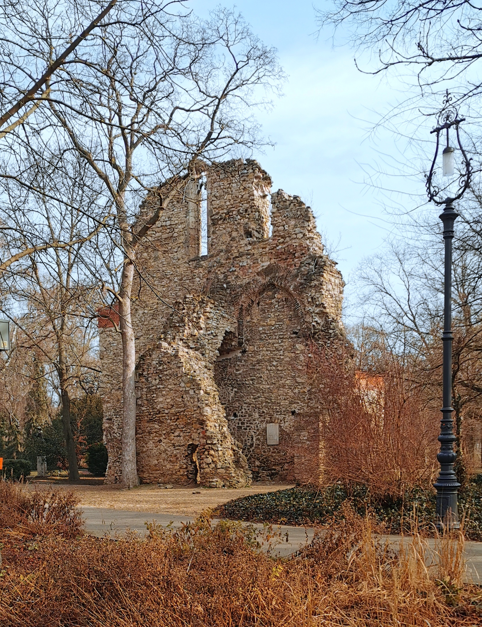 Ferences kolostor romja (Margit-sziget)